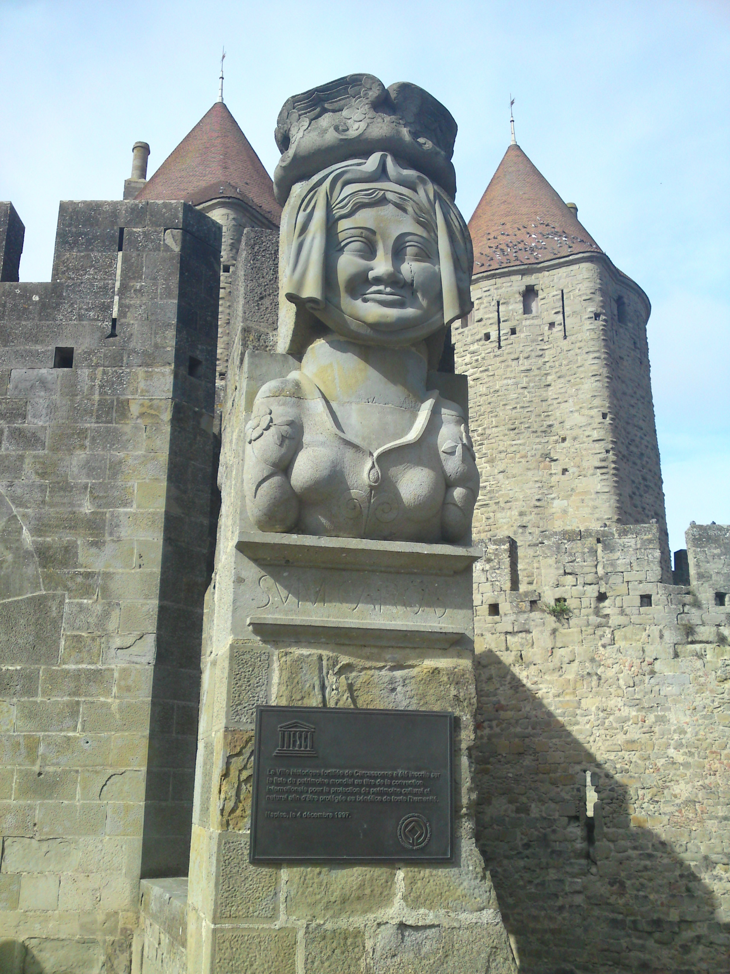 Buste représentant Dame Carcass à l'entrée de la Cité Médievale de Carcassonne